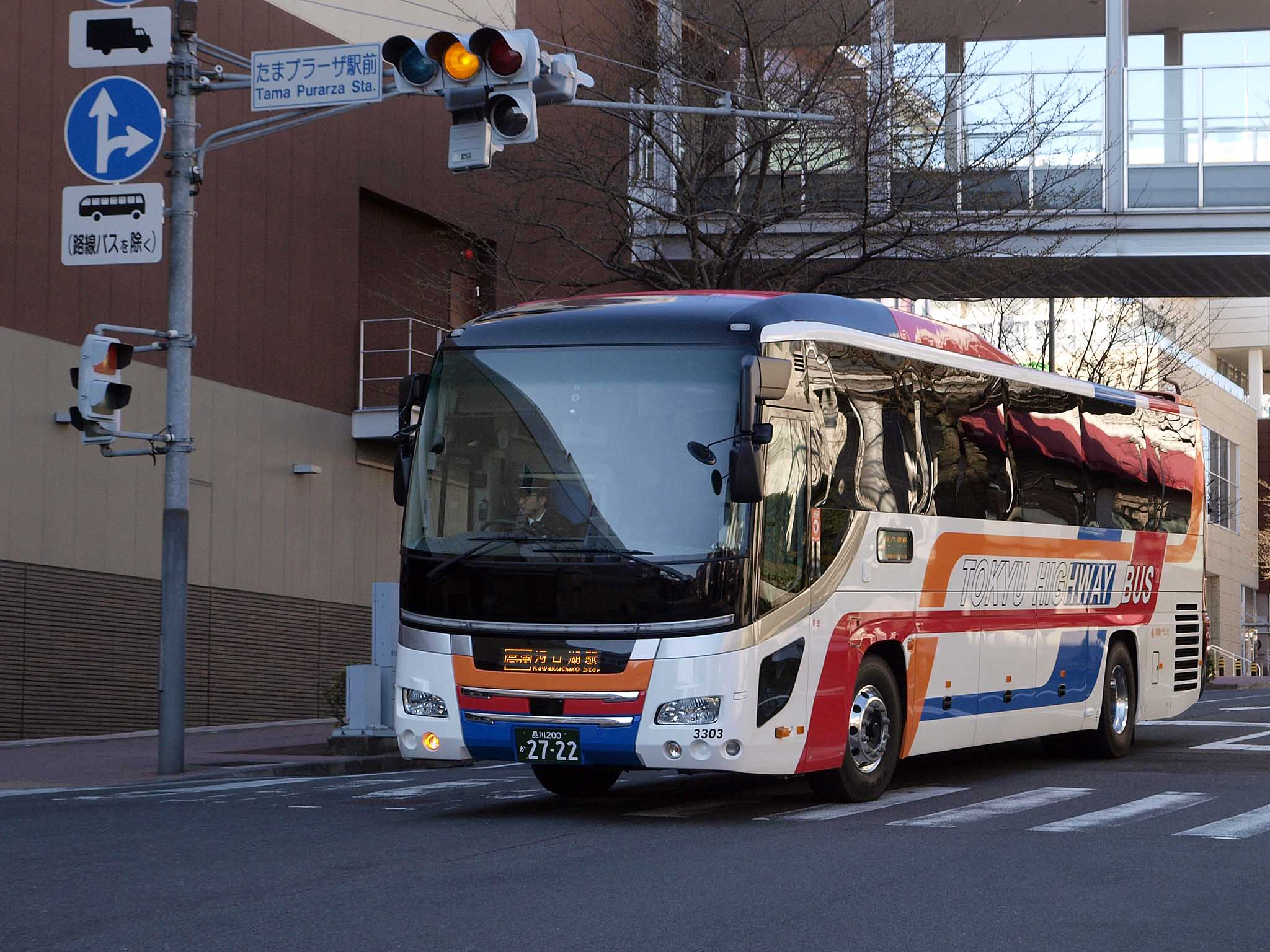 2014年3月より運行を開始した東急トランセのセンター北 - 河口湖線。 型式：QRG-RU1ASCA 登録番号：品川200か2722 撮影地：神奈川県横浜市青葉区、たまプラーザ駅